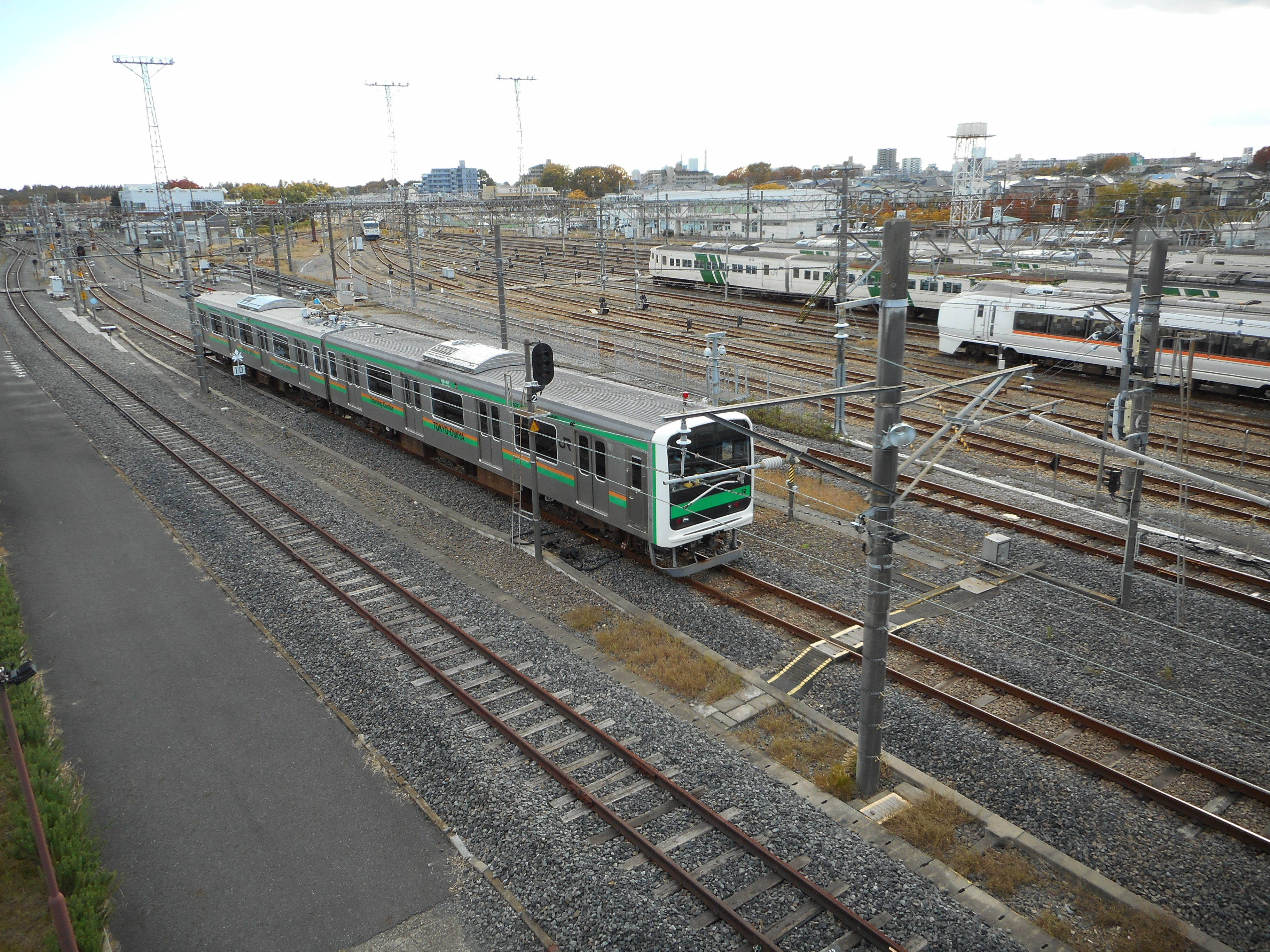 東大宮操車場構内にある、東京・大宮総合訓練センターで訓練走行中の209系改造訓練車（操車場南側で東西に跨ぐ陸橋より撮影）